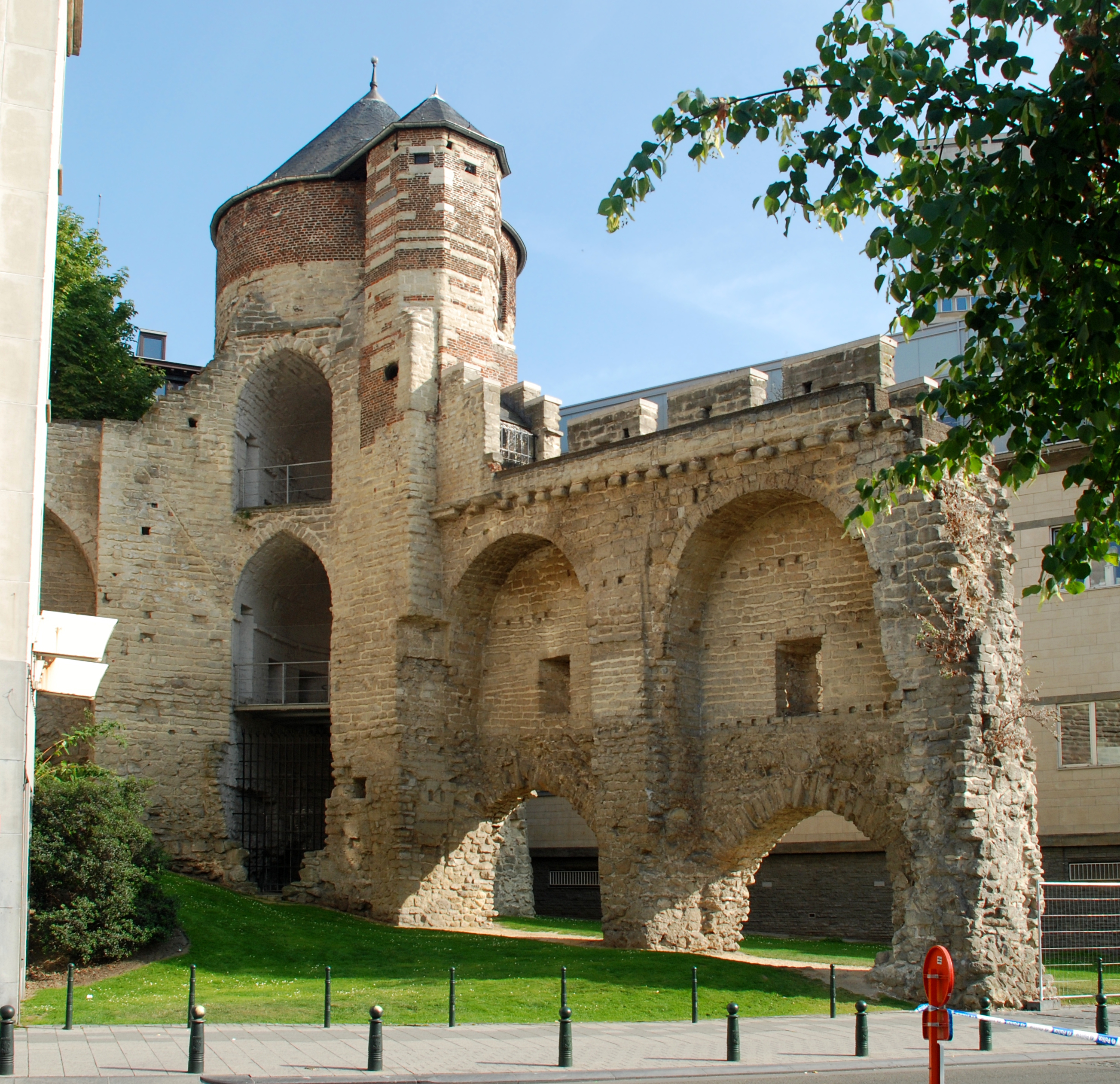 Belgique - Bruxelles - Tour Anneessens